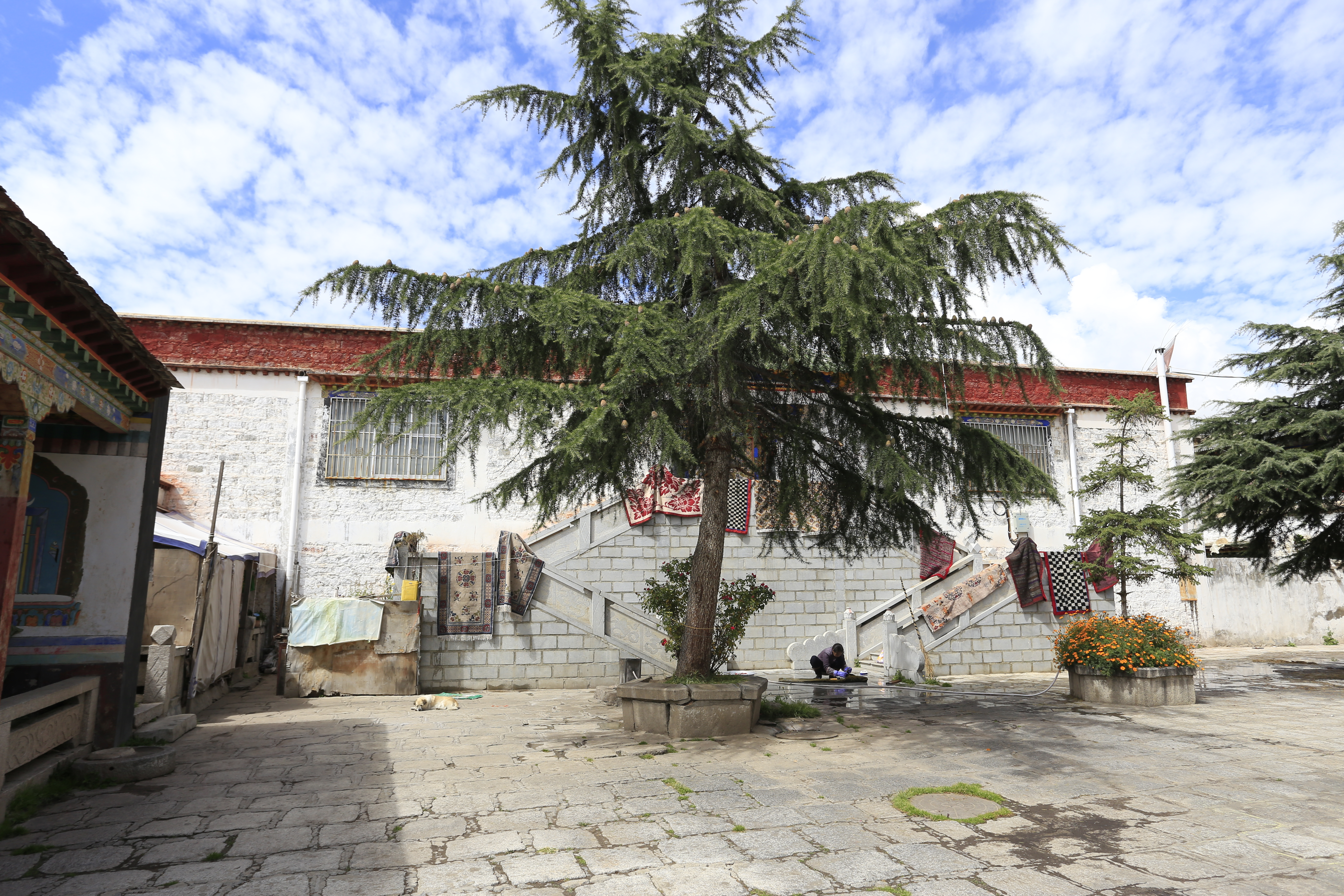 门孜康—— 院内